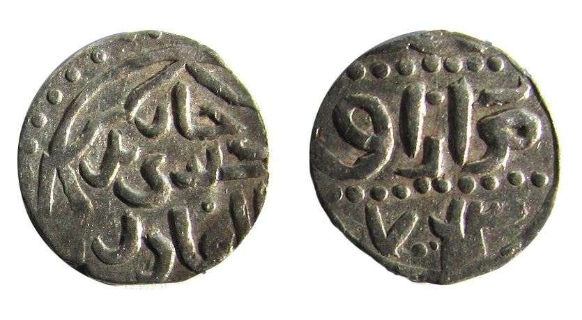 Найден в 2010 году в составе большого клада на территории Воронежской области